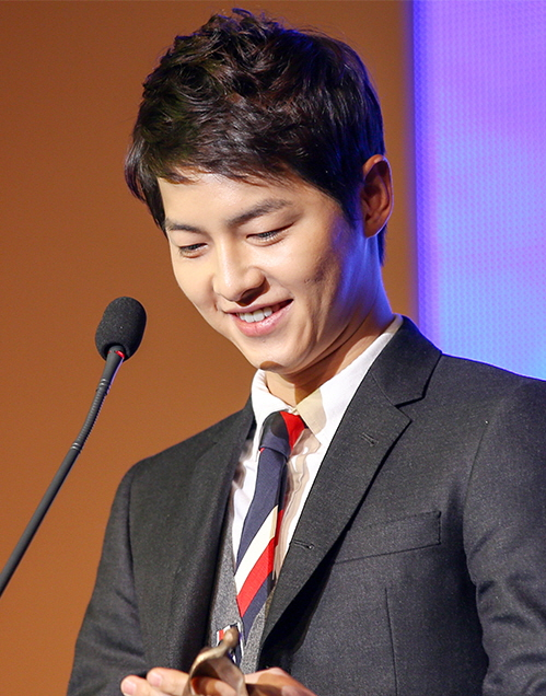 121206 문화연예대상 송중기